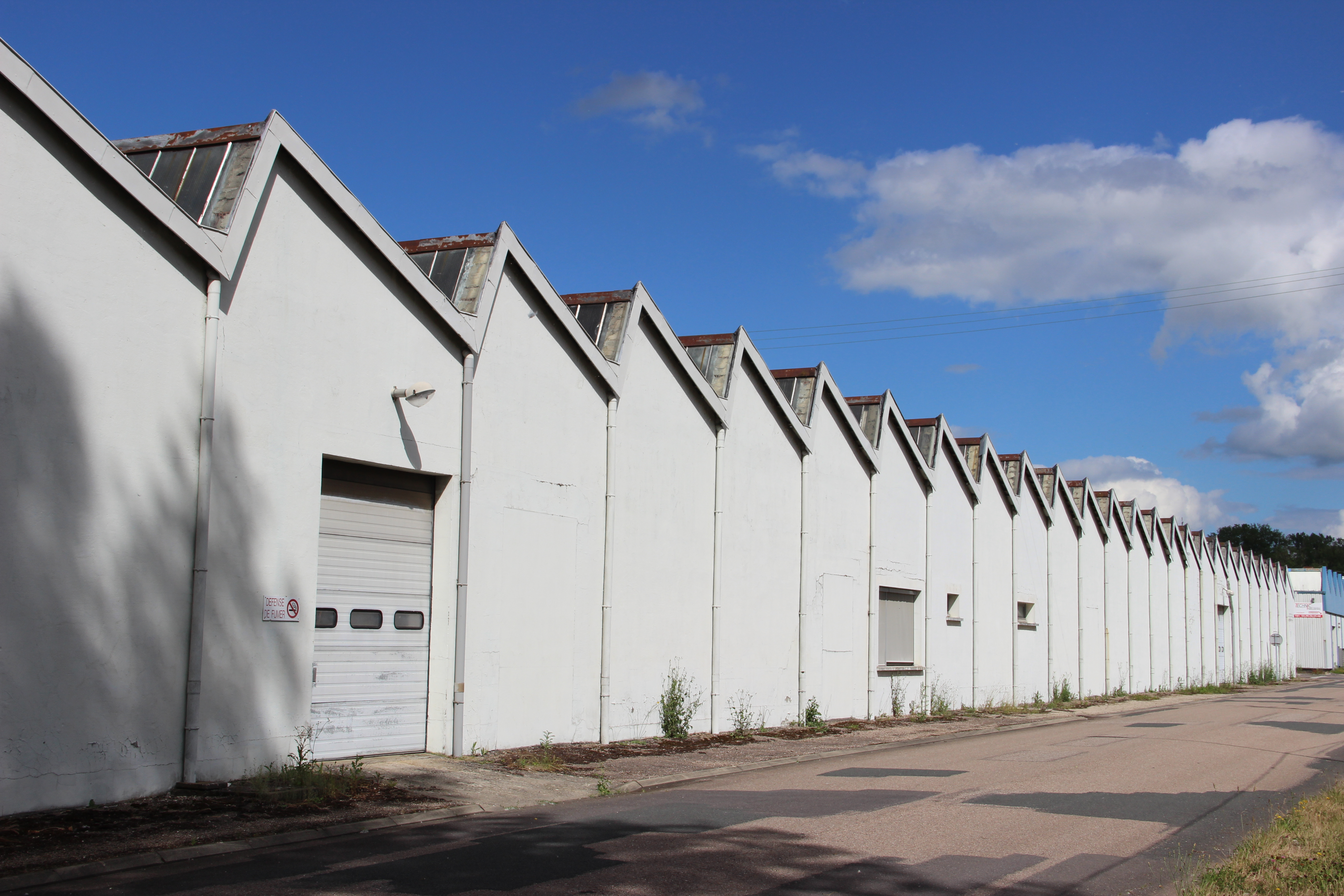 ZI de l'Ornain. Bâtiments de l'ancienne usine Rhovyl.